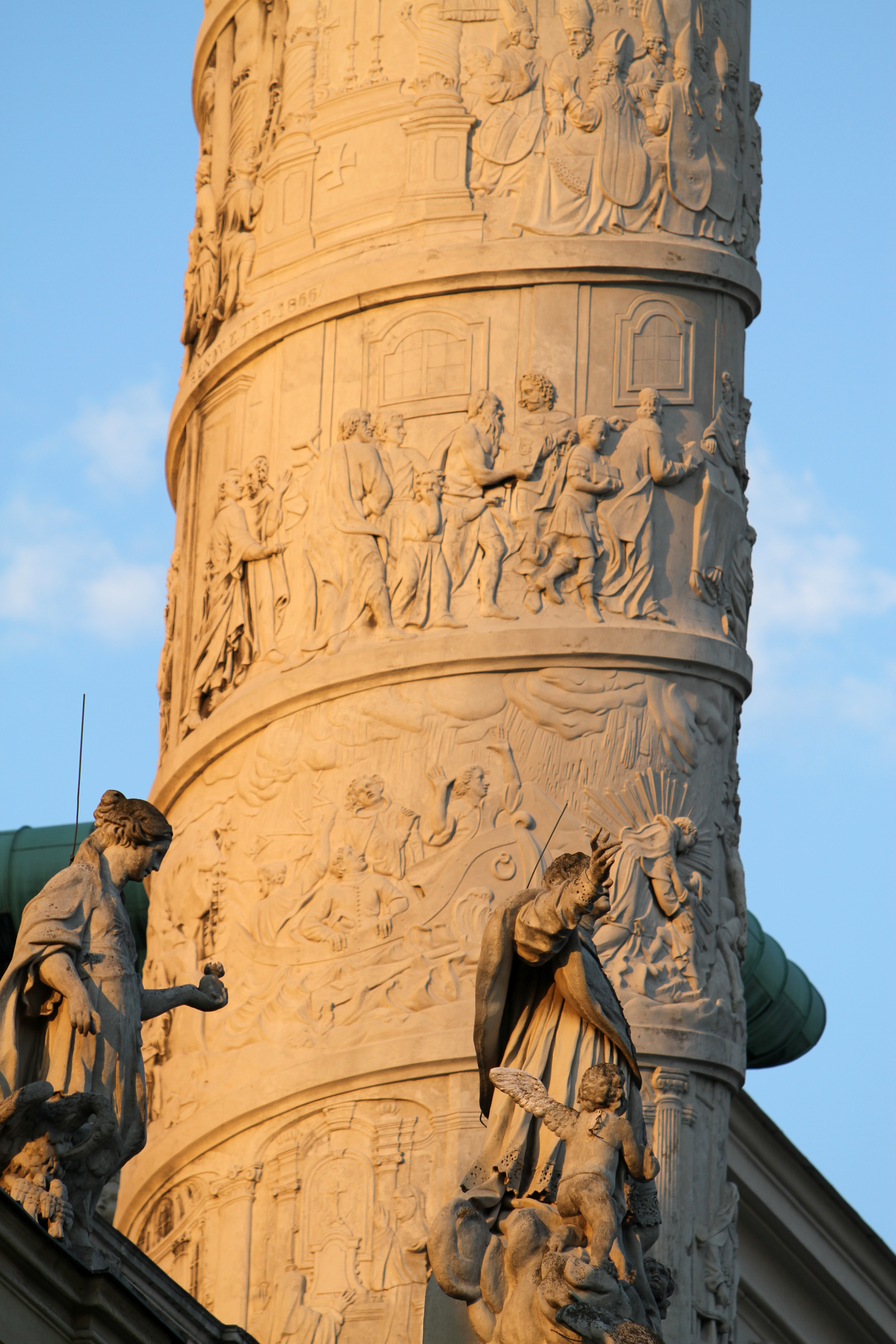 Kath. Pfarrkirche, Pfarrkirche Hl. Karl Borromäus (Karlskirche)